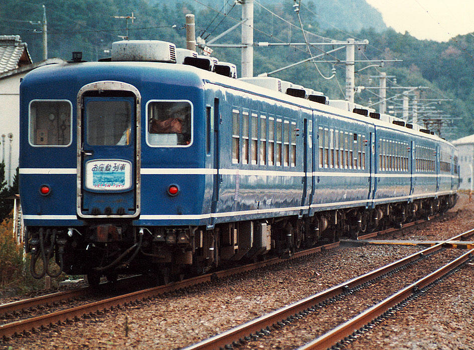 12系お座敷客車 ジョイフルトレイン